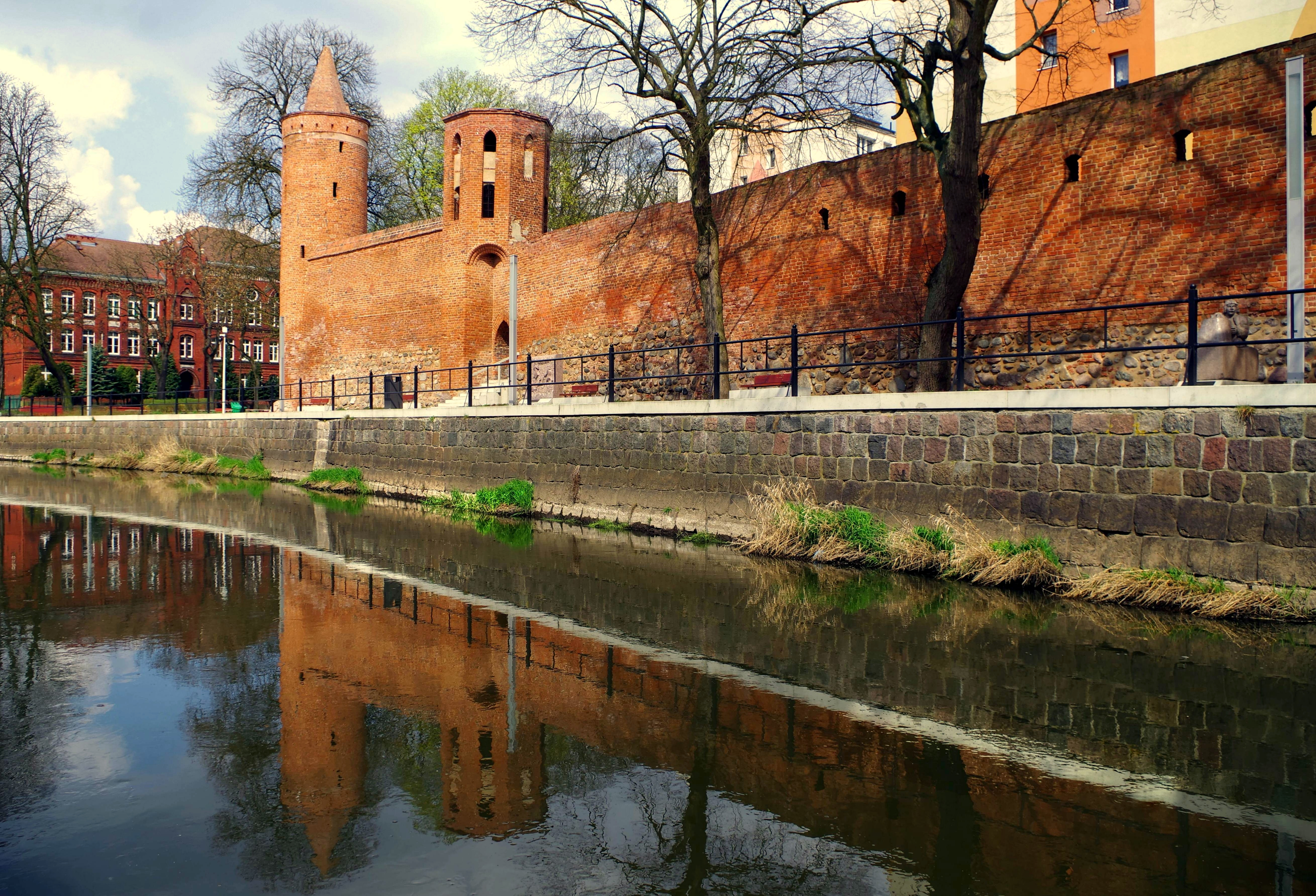 Goleniów, Poland